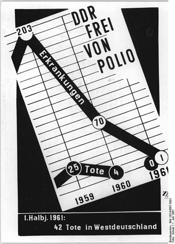 Infografik, DDR frei von Polio – 42 Opfer in Westdeutschland Zentralbild Schulz 1.7.1961 DDR frei von Polio – 42 Opfer in Westdeutschland. Fielen der Poliomyelitis 1960 in der DDR 4 Menschen zum Opfer, so waren es in Westdeutschland im gleichen Zeitraum 250 Personen. In Westdeutschland fielen der Poliomyelitisempidemie in diesem Jahr bereits 42 junge Menschen zum Opfer. Insgesamt wurden mehr als 650 Erkrankungen gemeldet. Demgegenüber erkrankte in der DDR nur ein Kind, eines der wenigen, das nicht gegen Kinderlähmung immunisiert worden war.